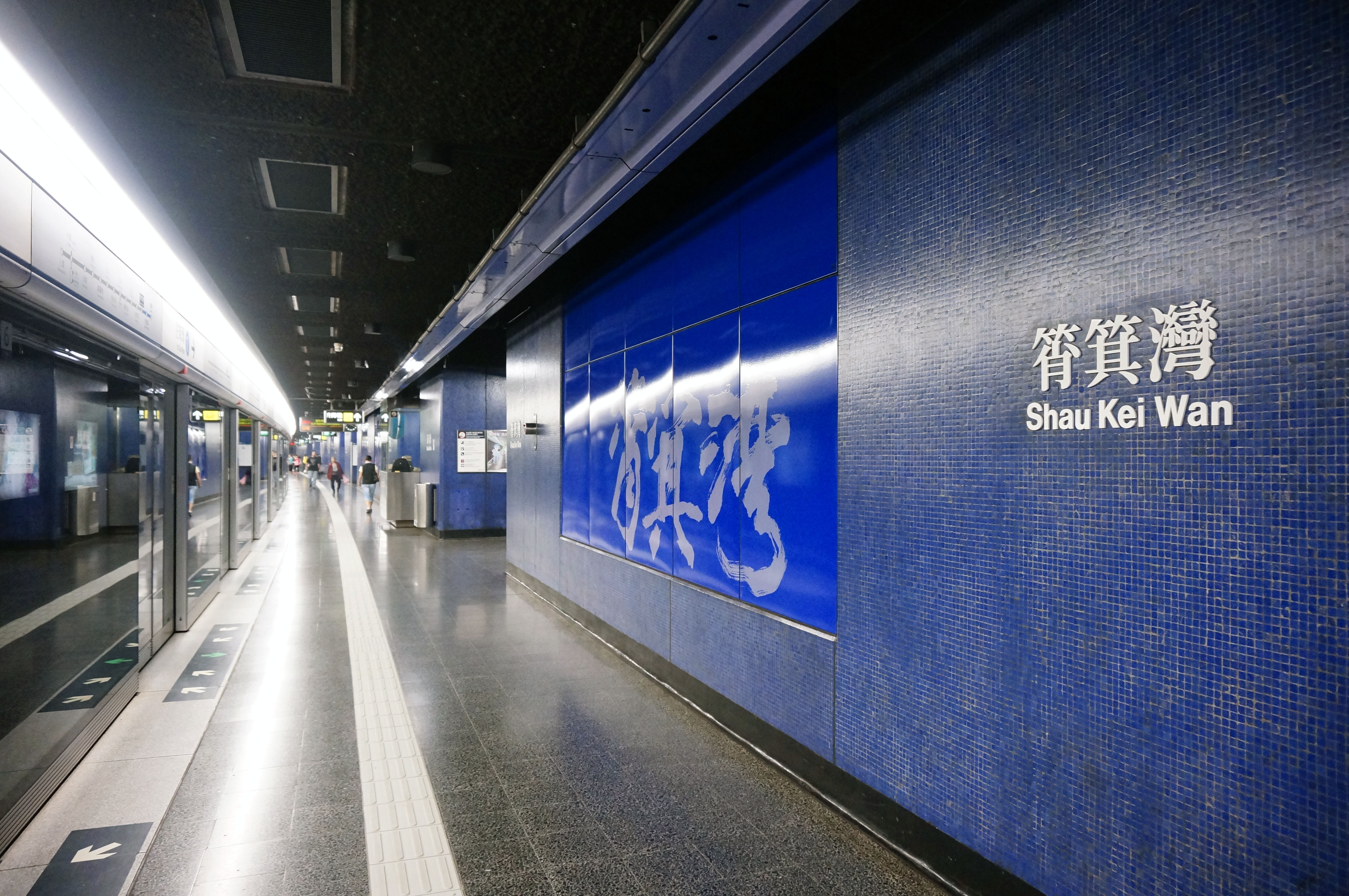 港鐵筲箕灣站月台